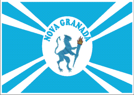 Bandeira da cidade de Nova Granada, SP